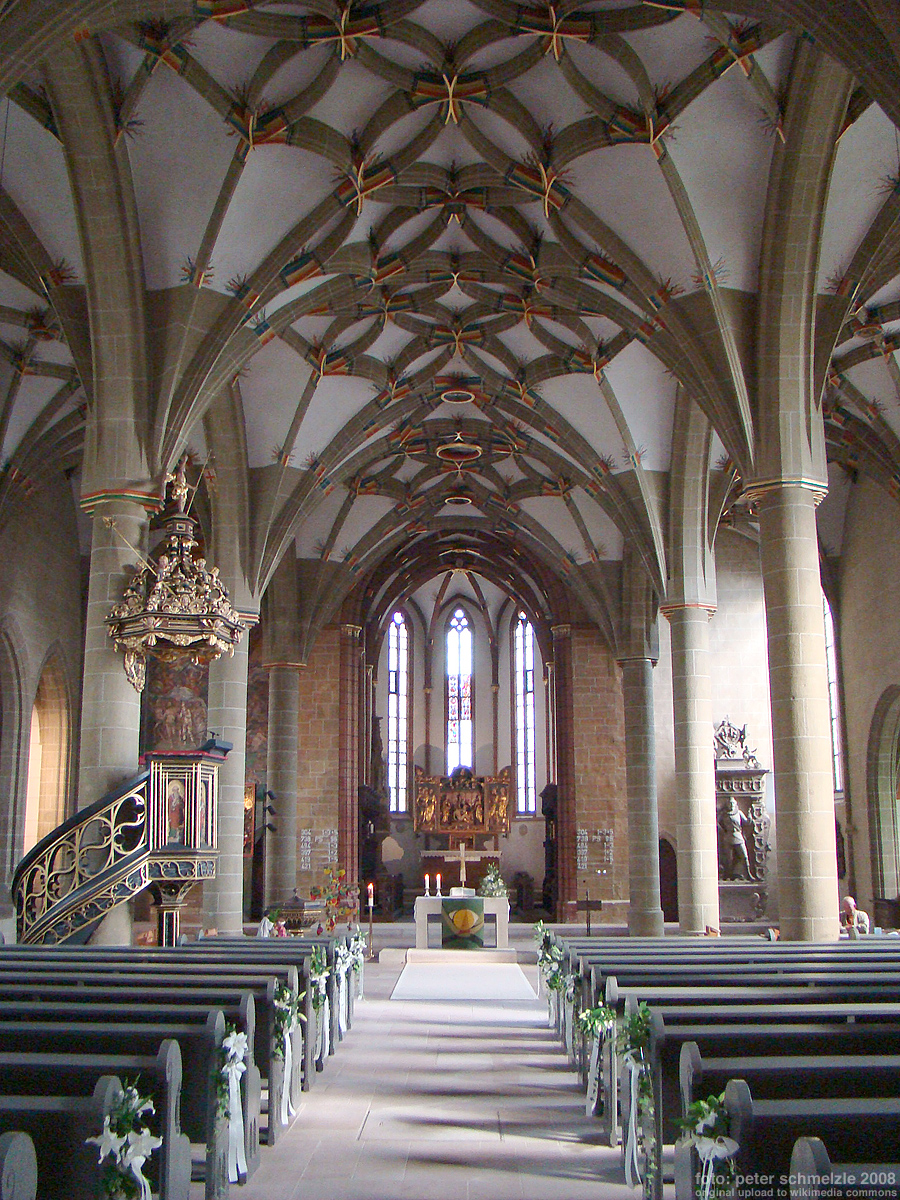 Blick zum Chor, Stadtkirche Bad Wimpfen